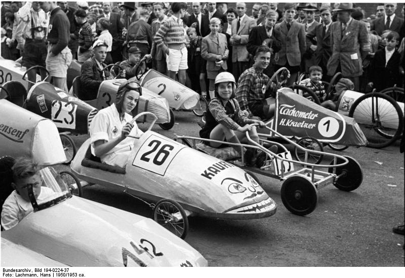 Seifenkistenrennen